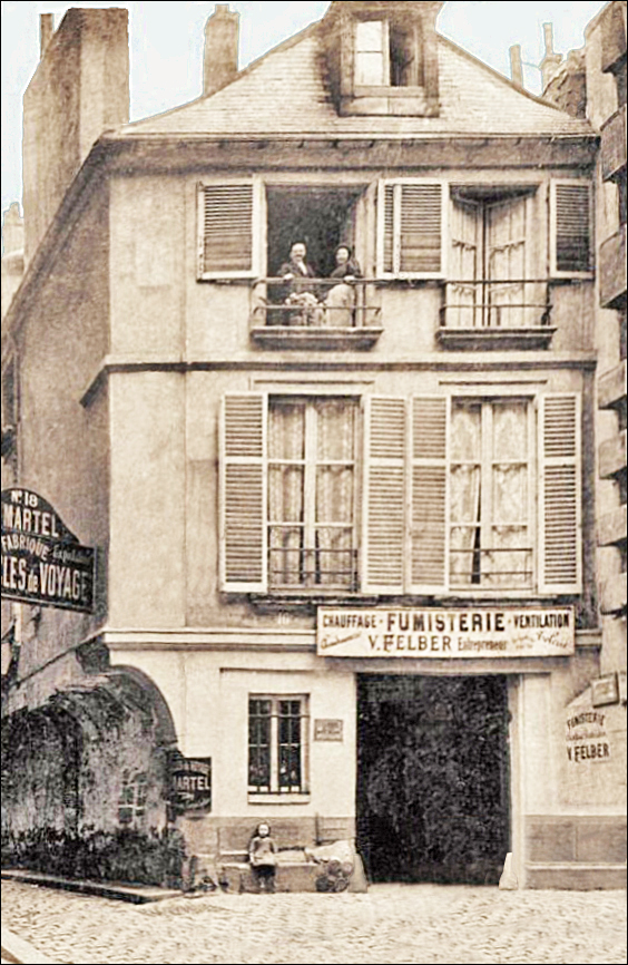 Atelier de chauffage - zinguerie - ventilation à paris vers 1900, avec logement du patron à l'étage.